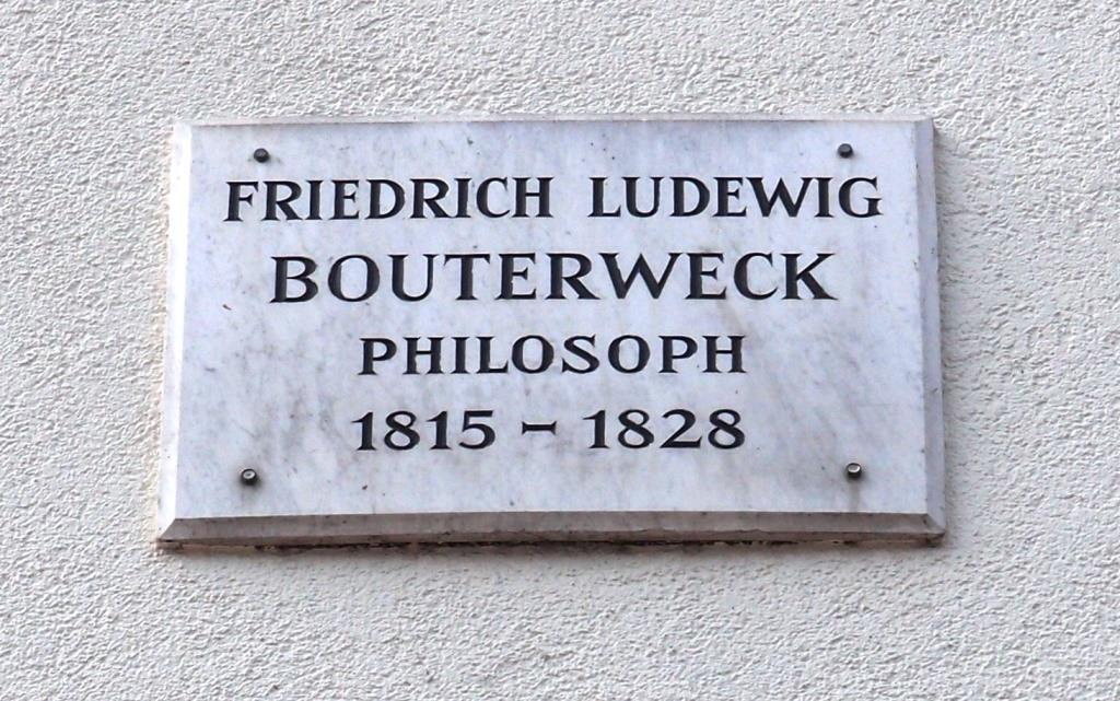 Gedenktafel für den Philosophen und Schriftsteller Friedrich Ludewig Bouterweck (1766-1828) in Göttingen, Weender Straße Ecke Reitstallstraße